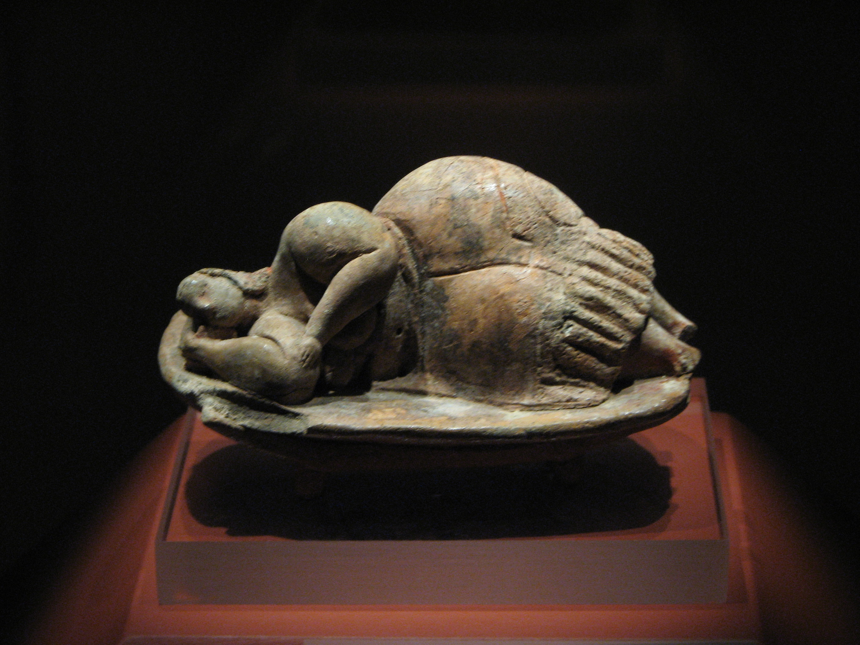 Speča gospa, eden od kipcev, ki so ga našli v hipogeju Hal Saflieni, Paola, Malta.